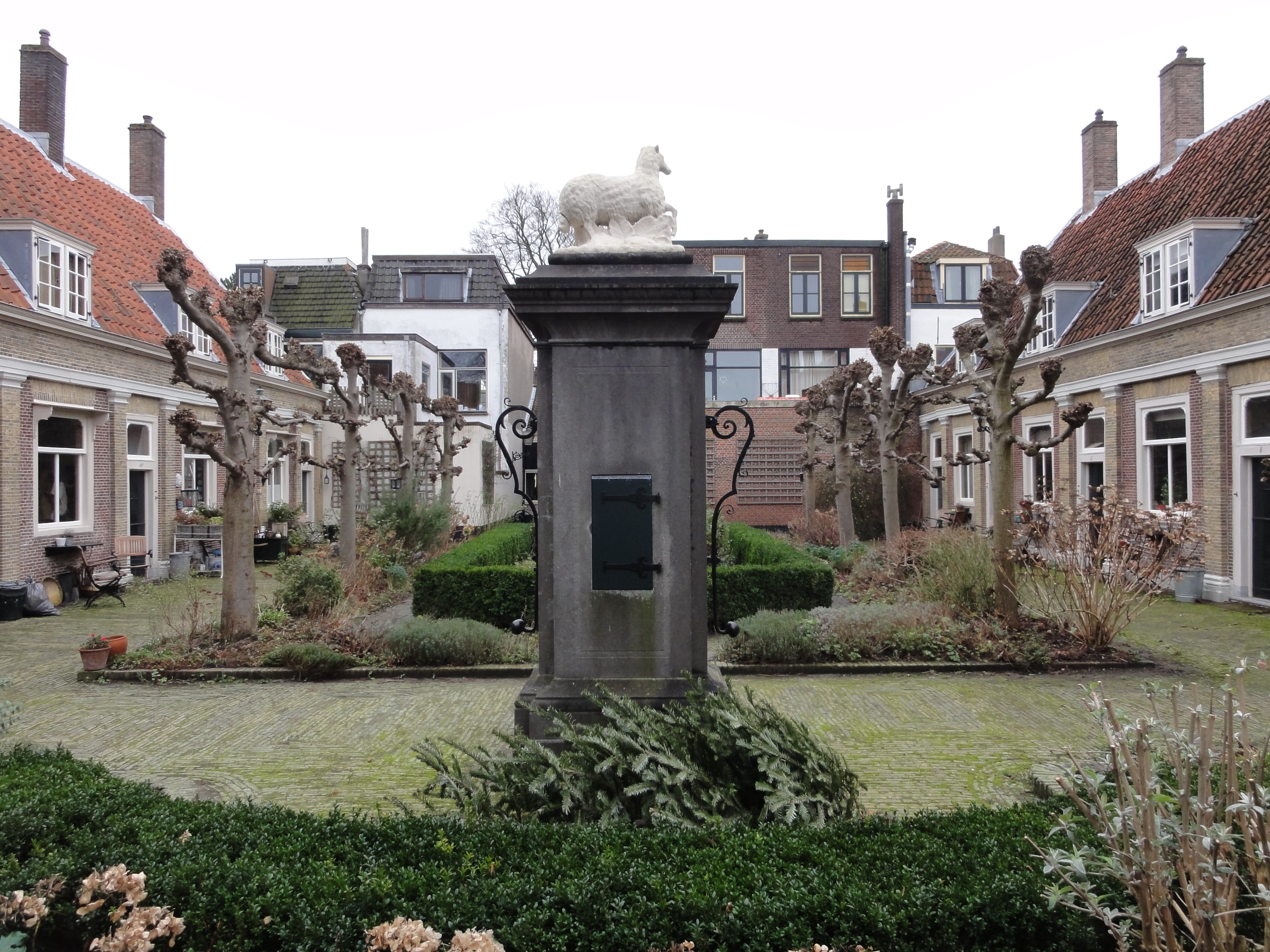 Eva van Hoogeveenhofje aan de Doelensteeg 7 te Leiden